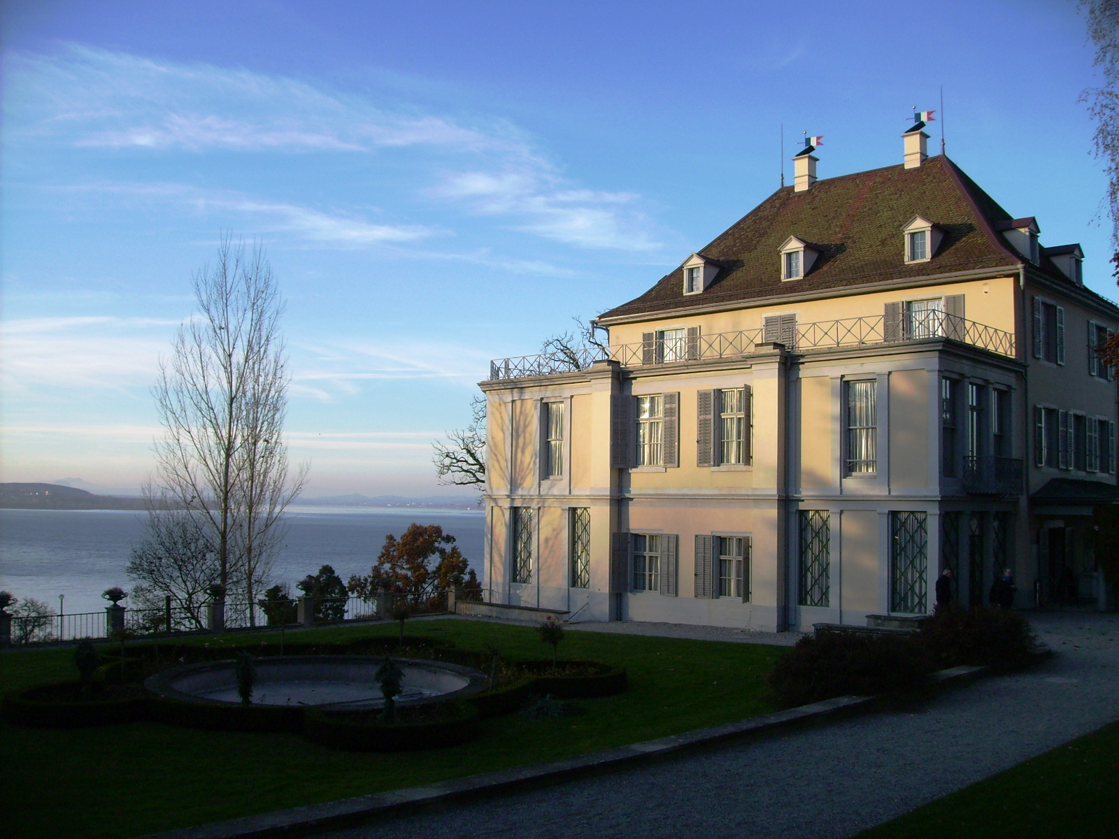 Schloss Arenenberg